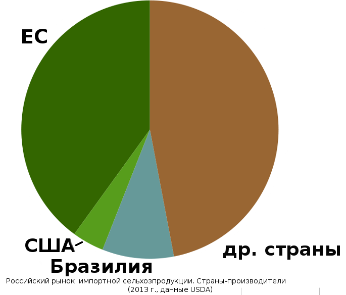 Происхождение товаров на российском рынке импортной сельхозпродукции (страны-производители). Источник данных